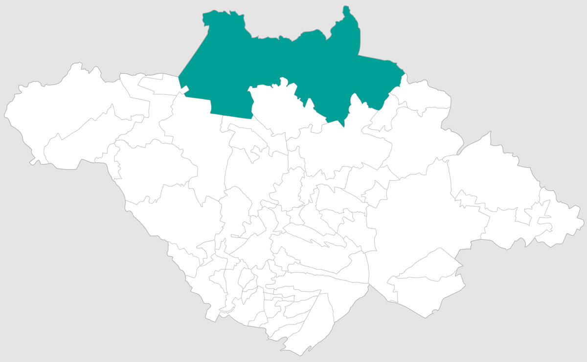 Mapa del municipio de Tlaxco